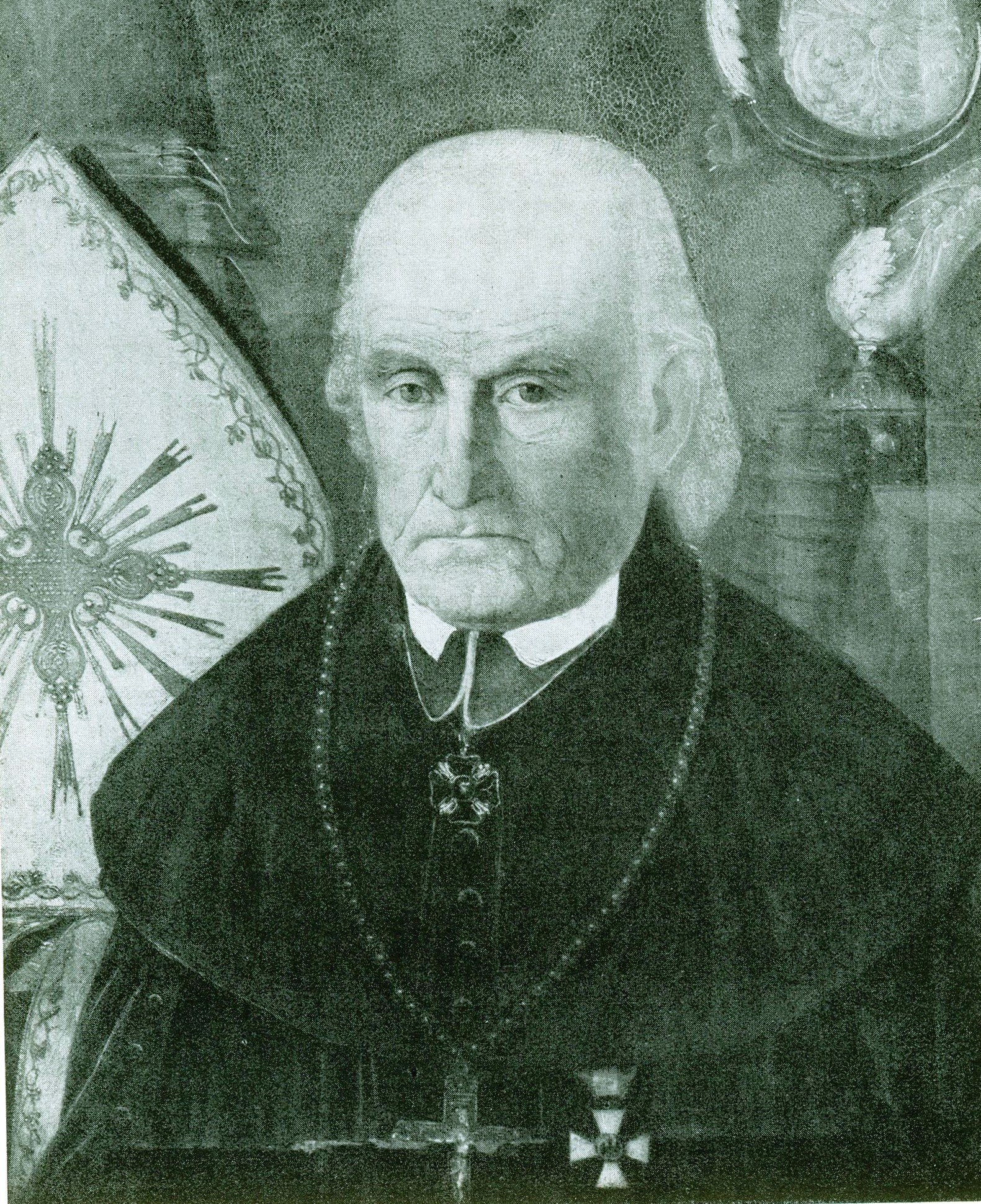 Biskup wrocławski Joseph Knauer